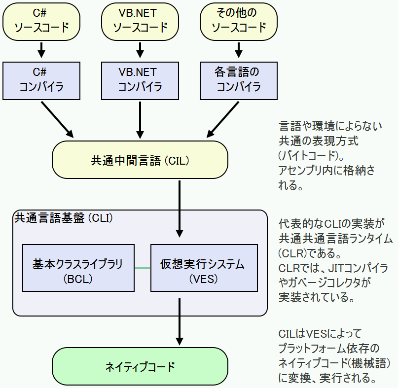 Diagram of Common Language Infrastructure (Japanese Ver.) 下記リンク先のSVGバージョンはテキスト形式ですので容易に編集可能です。編集したらこちらのPNGバージョンも更新してください。